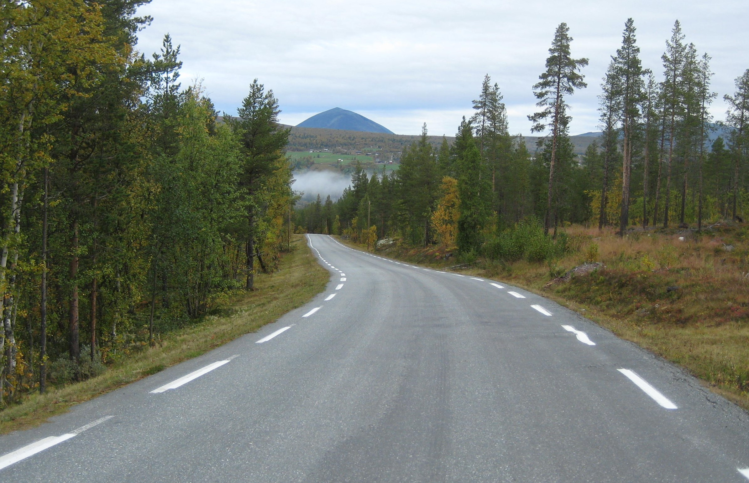 Fylkesvei 255 med Heidalsmuen i bakgrunnen